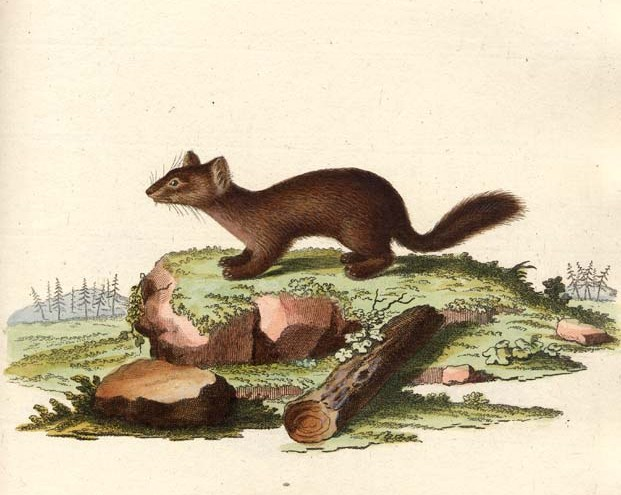 Martes zibellina, plate from Schreber, Johann Christian Daniel von, Histoire naturelle des quadrupèdes représentés d´après nature. Tome III. Le phoque, le chien, le chat, le putois, la loutre, la marte, l'ours, le didelphe, la taupe, la souris, le hérisson A Erlang, chez Wolfgang Walther, 1780